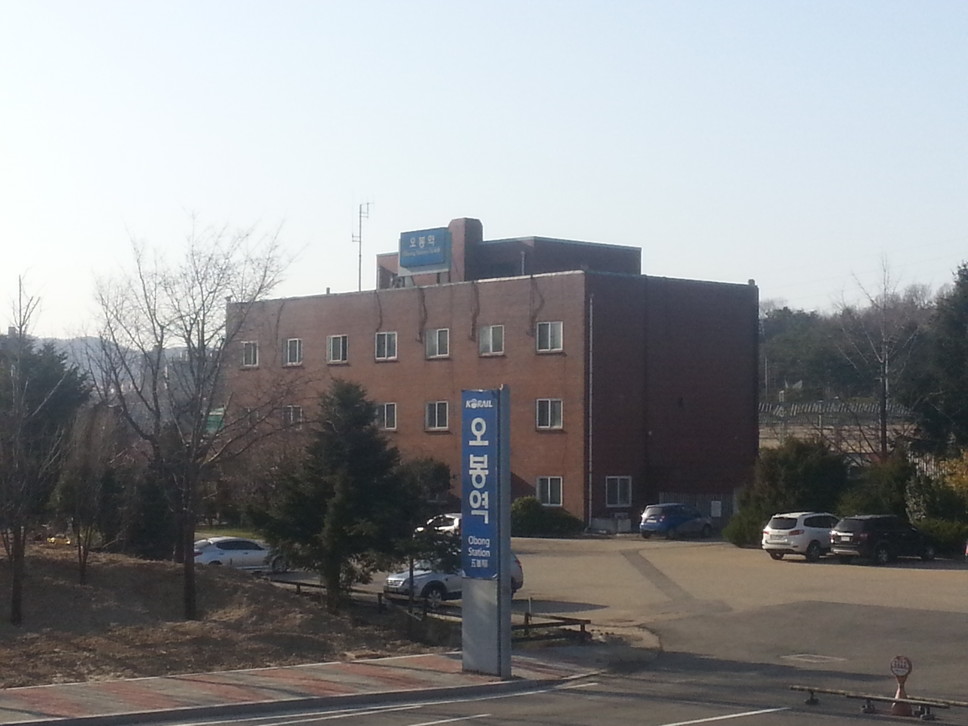 오봉역 역사